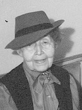 Ricarda Huch im Kulturbundklub 1946